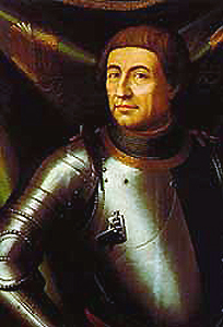 Juan de Juanes se basó en un retrato de Pisanello. Alfonso V de Aragón (1416-1458) viste armadura de época de Carlos I de España. La cabeza sin cubrir expresa su condición pacífica. En primer término, encima de la mesa, se presentan objetos significativos: corona (rey), yelmo (conquistador) y libro abierto (cultura). Este último denota su amor por la cultura y figura asimismo en la corona, la cortina del fondo, el pomo de la espada y el lateral del casco. La corona está ornamentada con piedras preciosas en su aro y cuernos de la abundancia, símbolo de la prosperidad. El libro muestra título y autor: "DE BELLO CIVILI LIB. I" y "C. IVLI. CAESARIS" (La guera civil de Julio César), y une la condición militar con la sabiduría, las armas y las letras. A través del ventanal se observa un paisaje con ruinas romanas, y se ha postulado que aparece el Castel Nuovo de Nápoles, residencia del rey de Aragón tras su conquista de Nápoles.